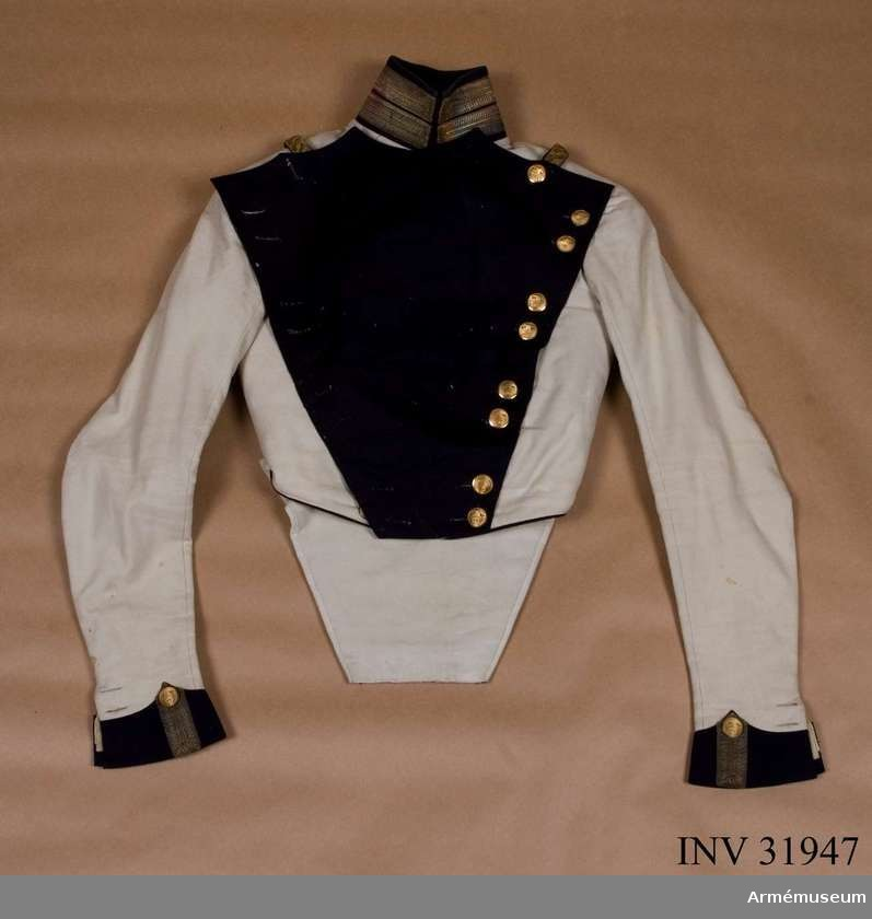 Frack m/1823 för Livregementets Dragonkår. Buren av O M Björnstjerna f.1819, ordonnansofficer hos kronprins Oskar 1840. ID nummer AM.031947